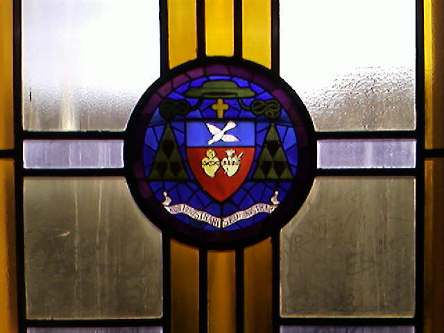 LTP Montplaisir Valence Détail d'un vitrail Cage d'escalier sud